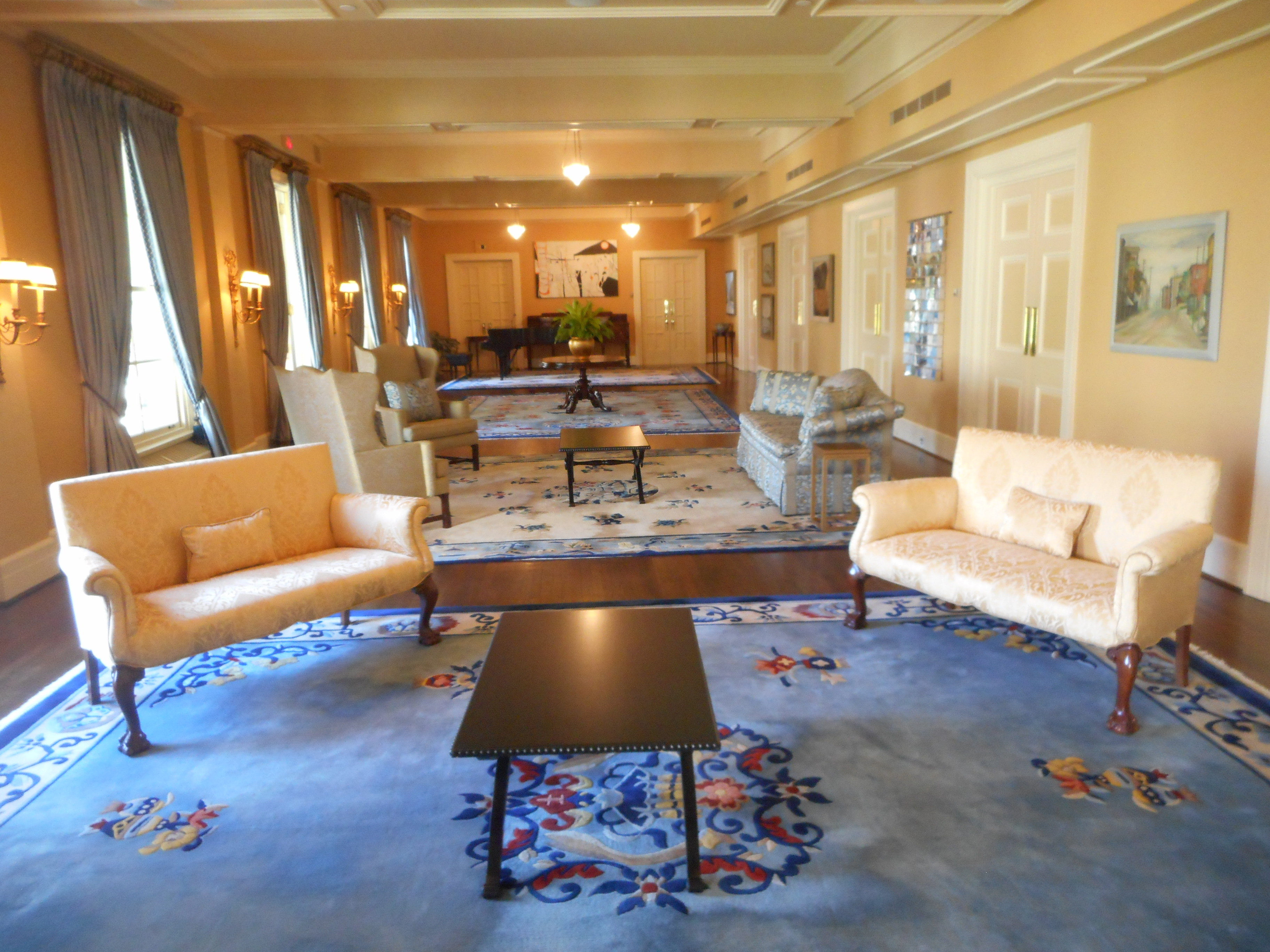 Rideau Hall, Ottawa